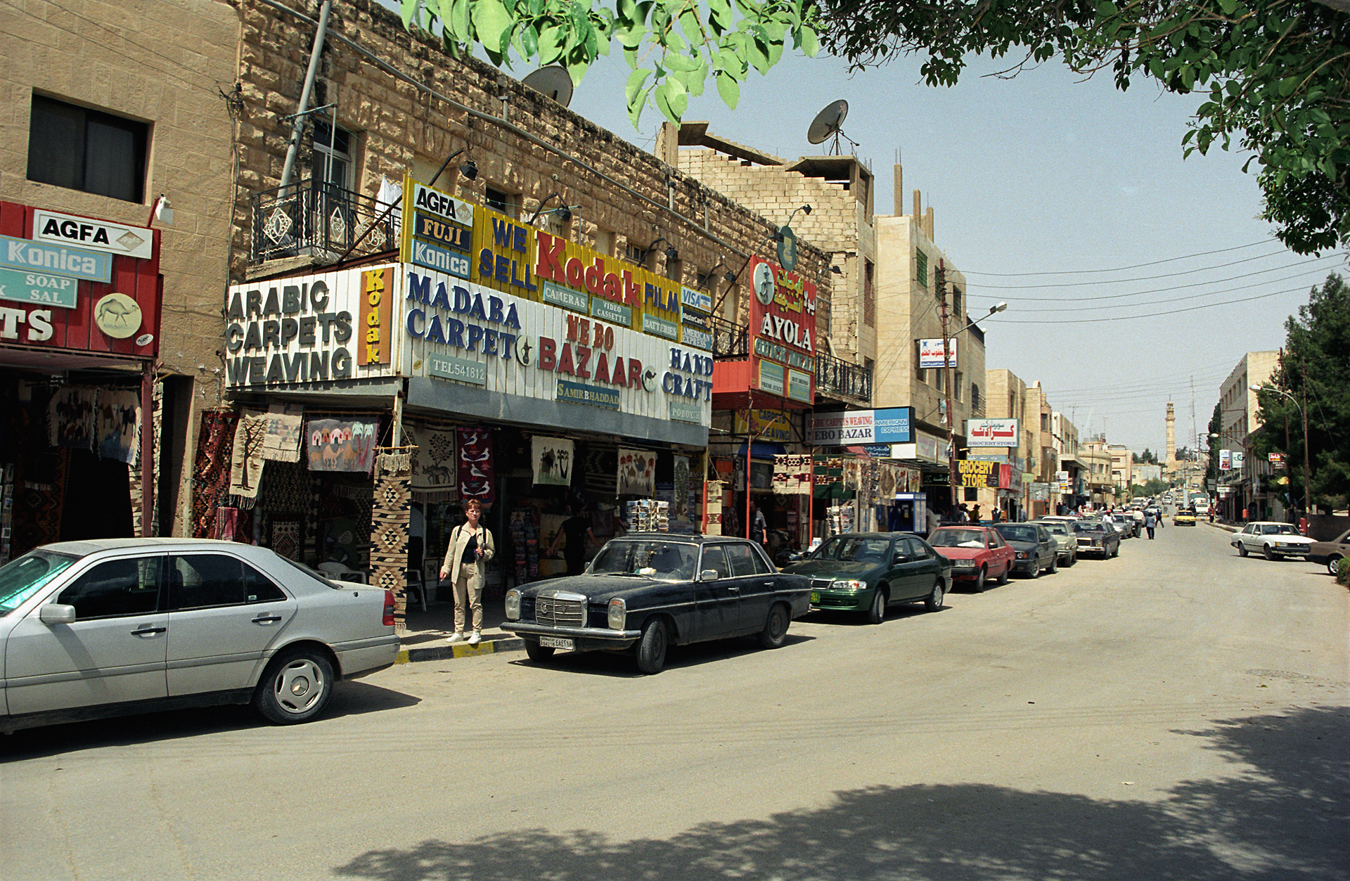 Madaba, Jordan